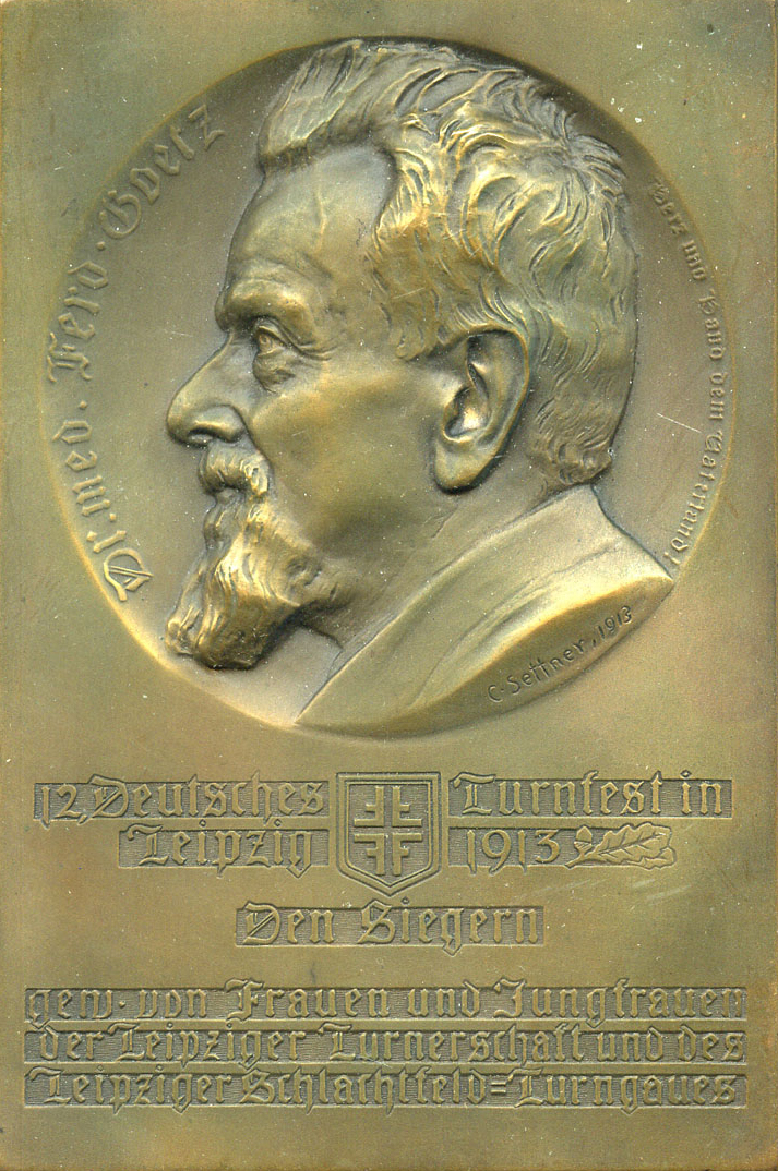 Deutsches Turnfest 1913 in Leipzig, Ehrenplakette für die besten Turner